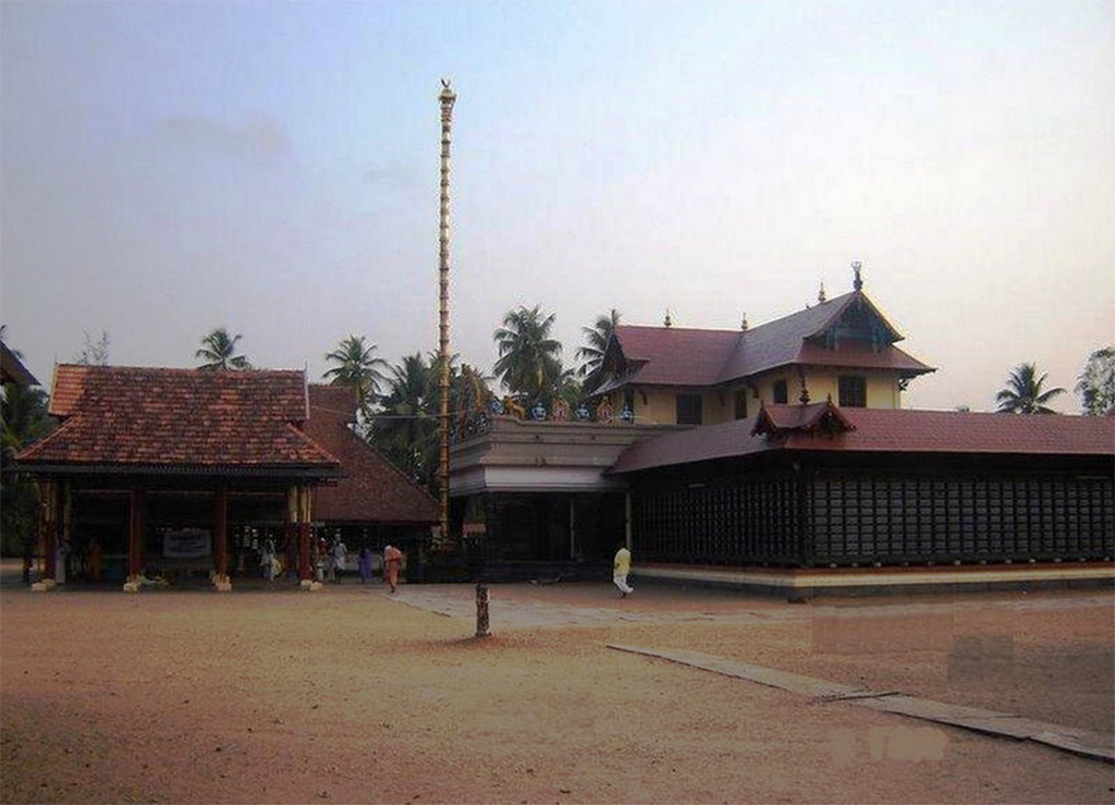 ഹരിപ്പാട്ക്ഷേത്രം